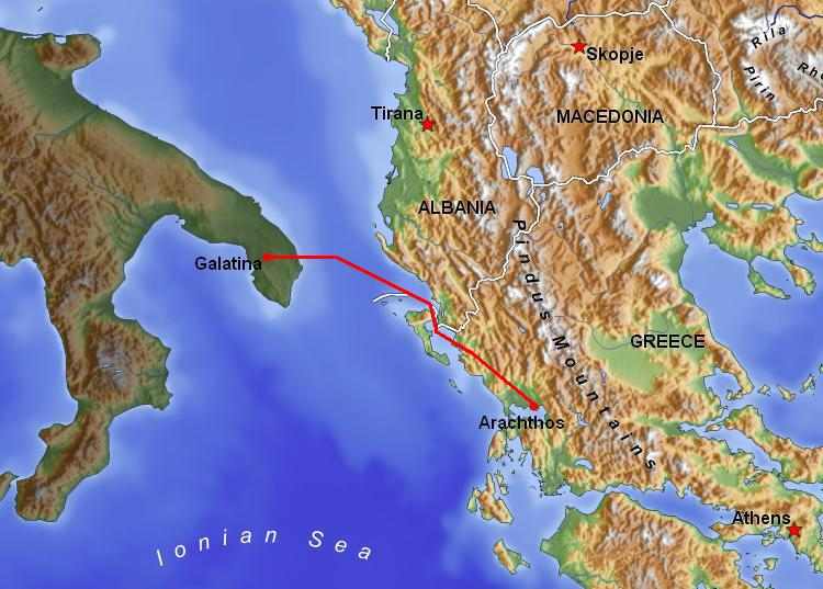 HVDC Italy–Greece Sources: [1] from page Energy infrastructure in Italy, and [2] from Italy - Greece HVDC link